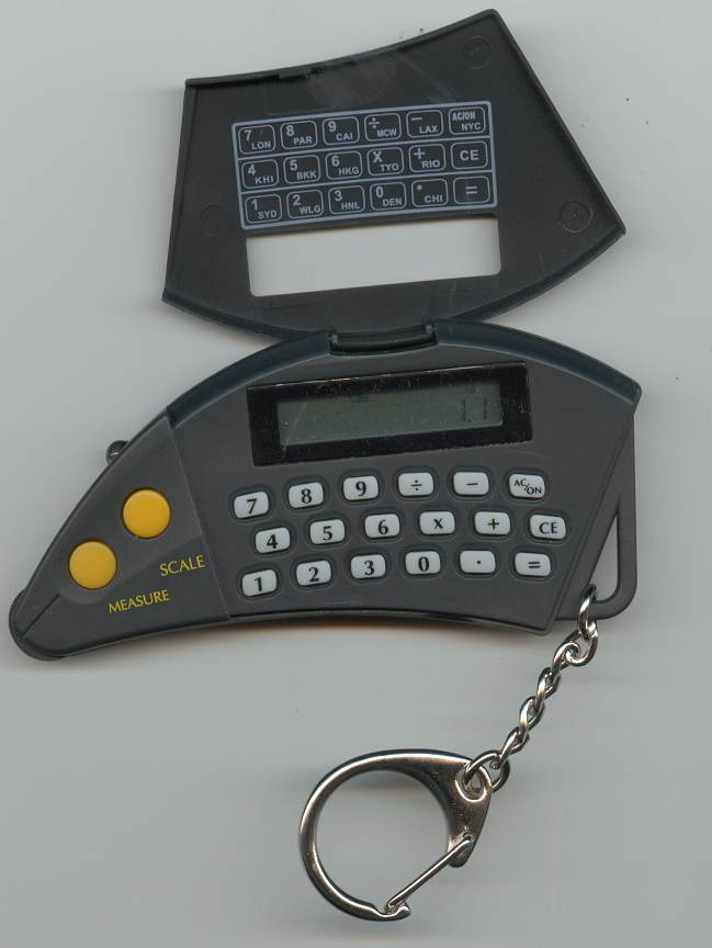 Curvimeter, eigen curvimeter op de scanner gelegd, Bestand:Eleccurvimeter.jpg